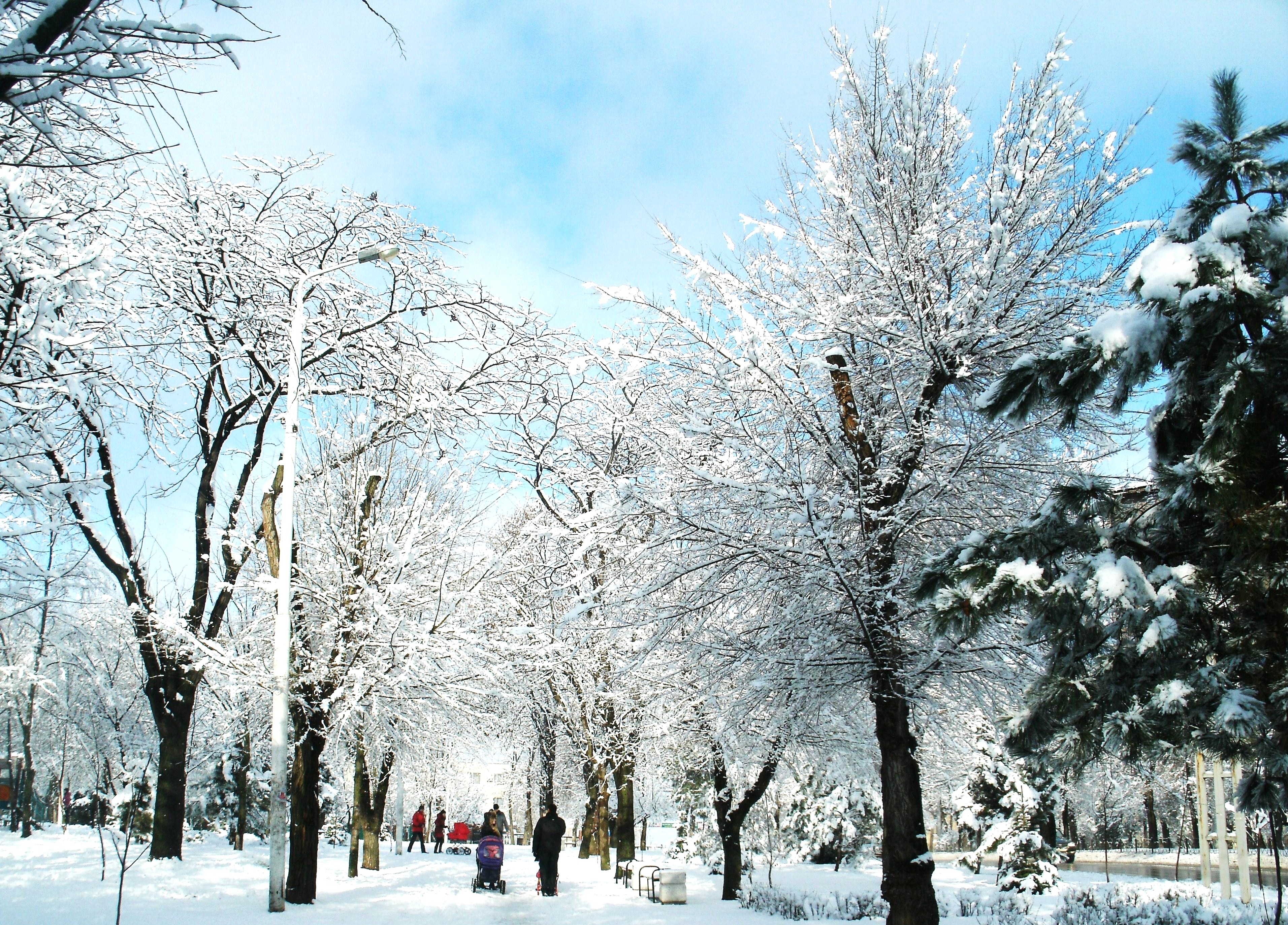 Ботанический сад ЮФУ This image is related to the protected area of Russia number 6110114